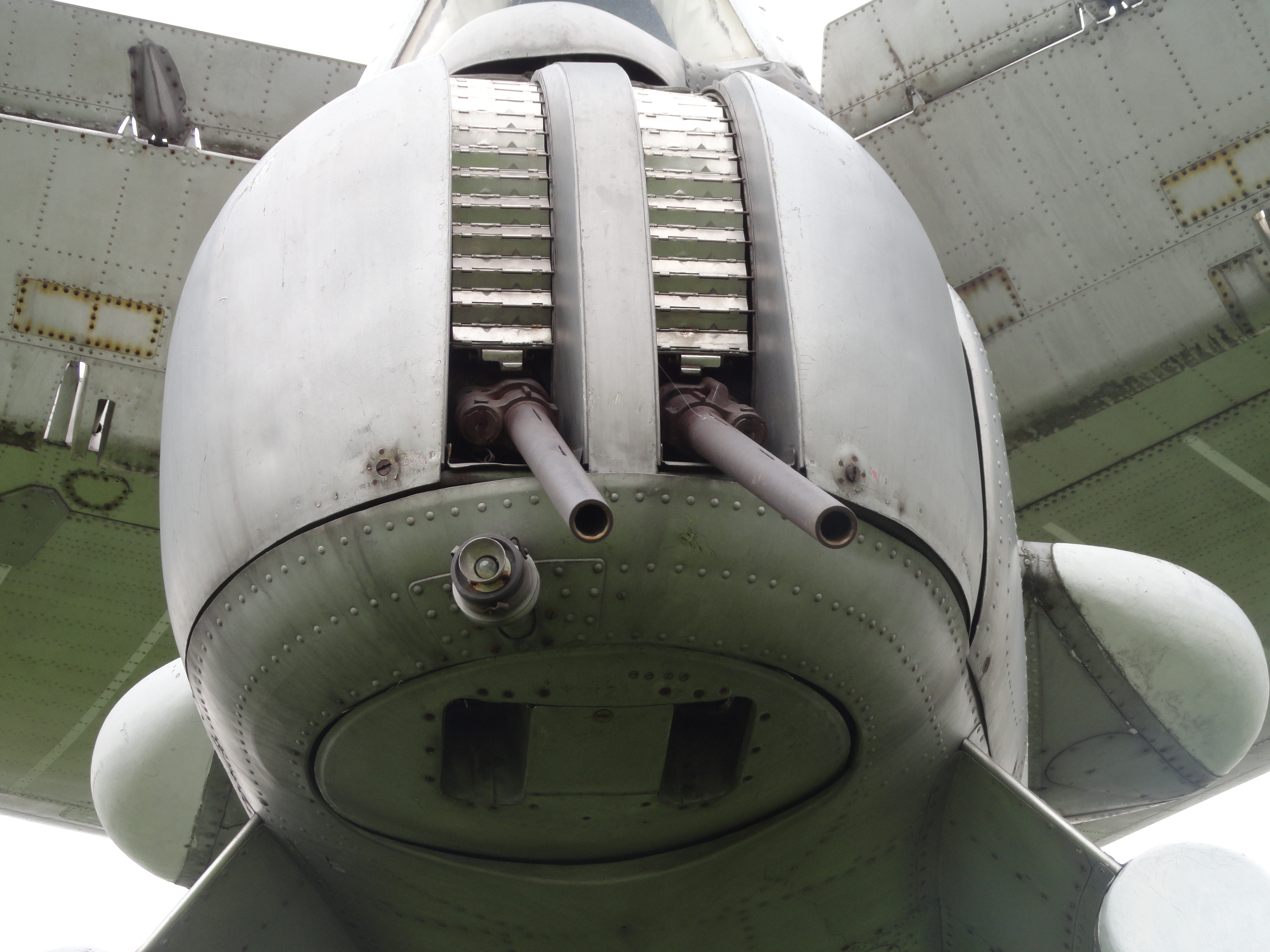 Пушки АМ-23 в кормовой оборонительной установке самолёта Ту-142. Фото в музее авиации в Киеве